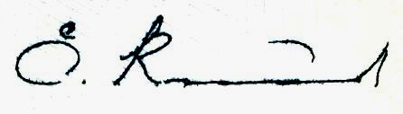 Azərbaycan Respublikası Mərkəzi Bankının sədri Elman Rüstəmovun imzası